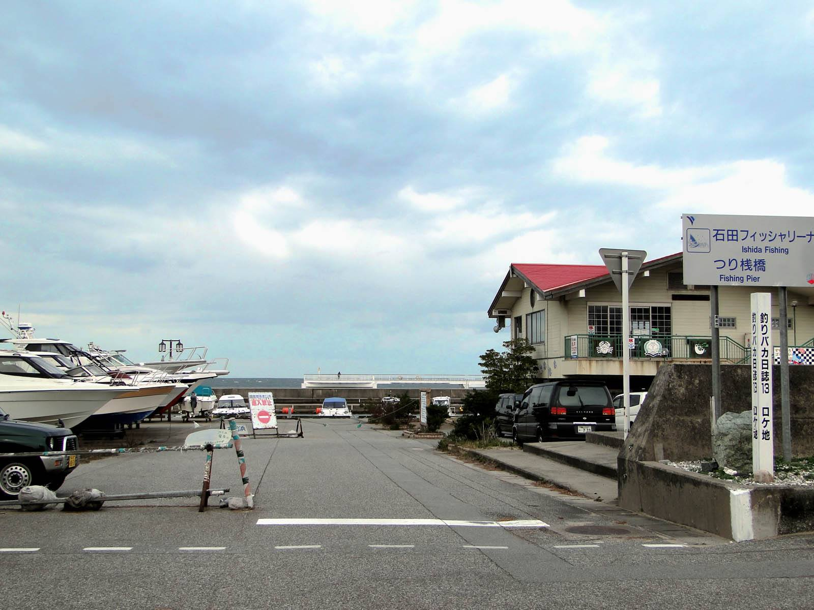 石田フィッシャリーナ - ISHIDA海浜エリア(富山県黒部市石田浜のマリンリゾート)の一施設説明的写真、看板、記念柱、釣り桟橋、プレージャーボート、売店(セミナーハウスだそうです)。